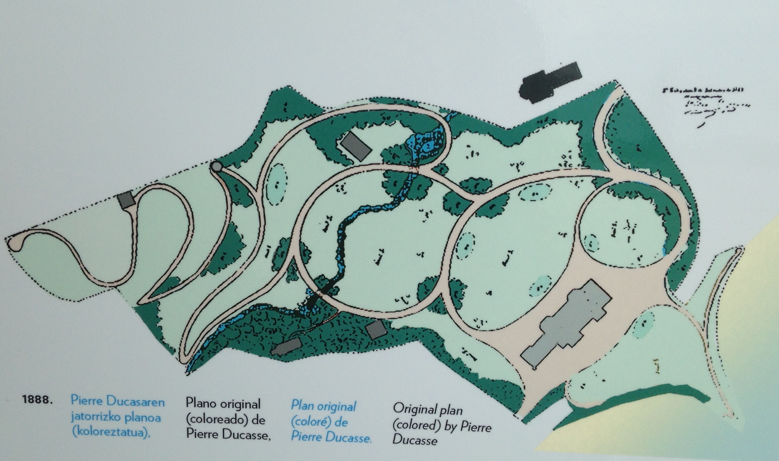 Miramar parkearen jatorrizko proiektua (oinplanoa), Donostia